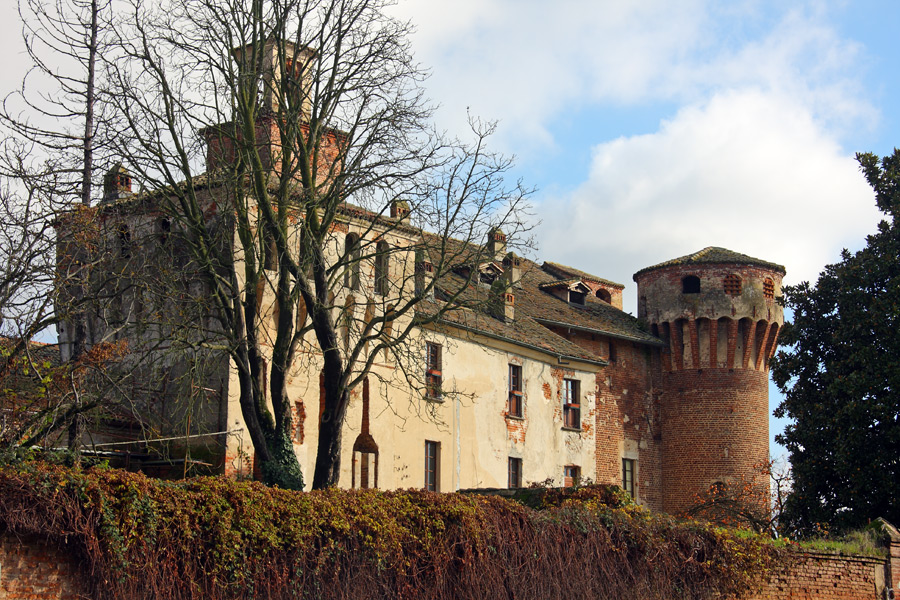 Castello di Valeggio (PV), vista del lato occidentale